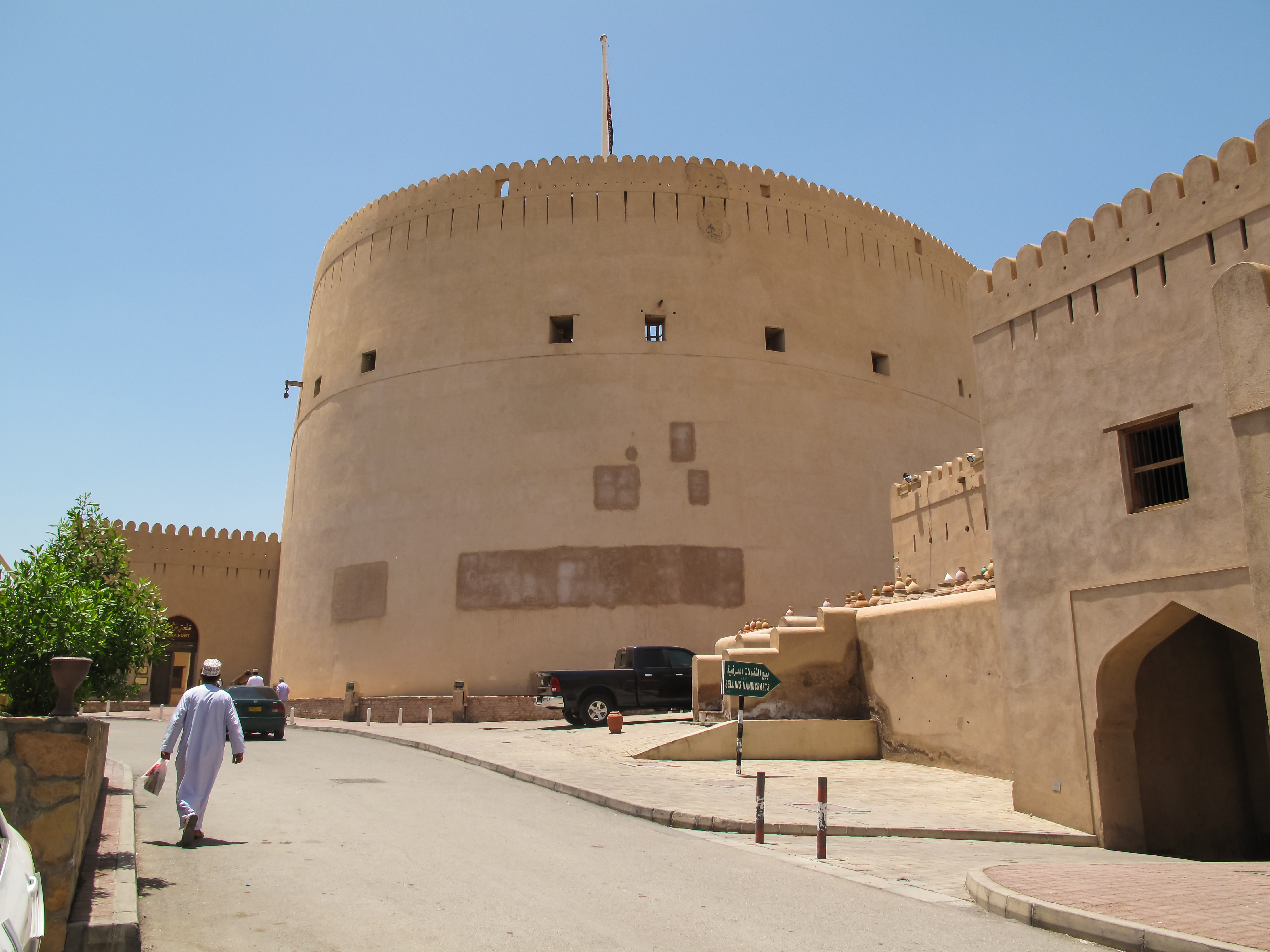 Nizwa Fort